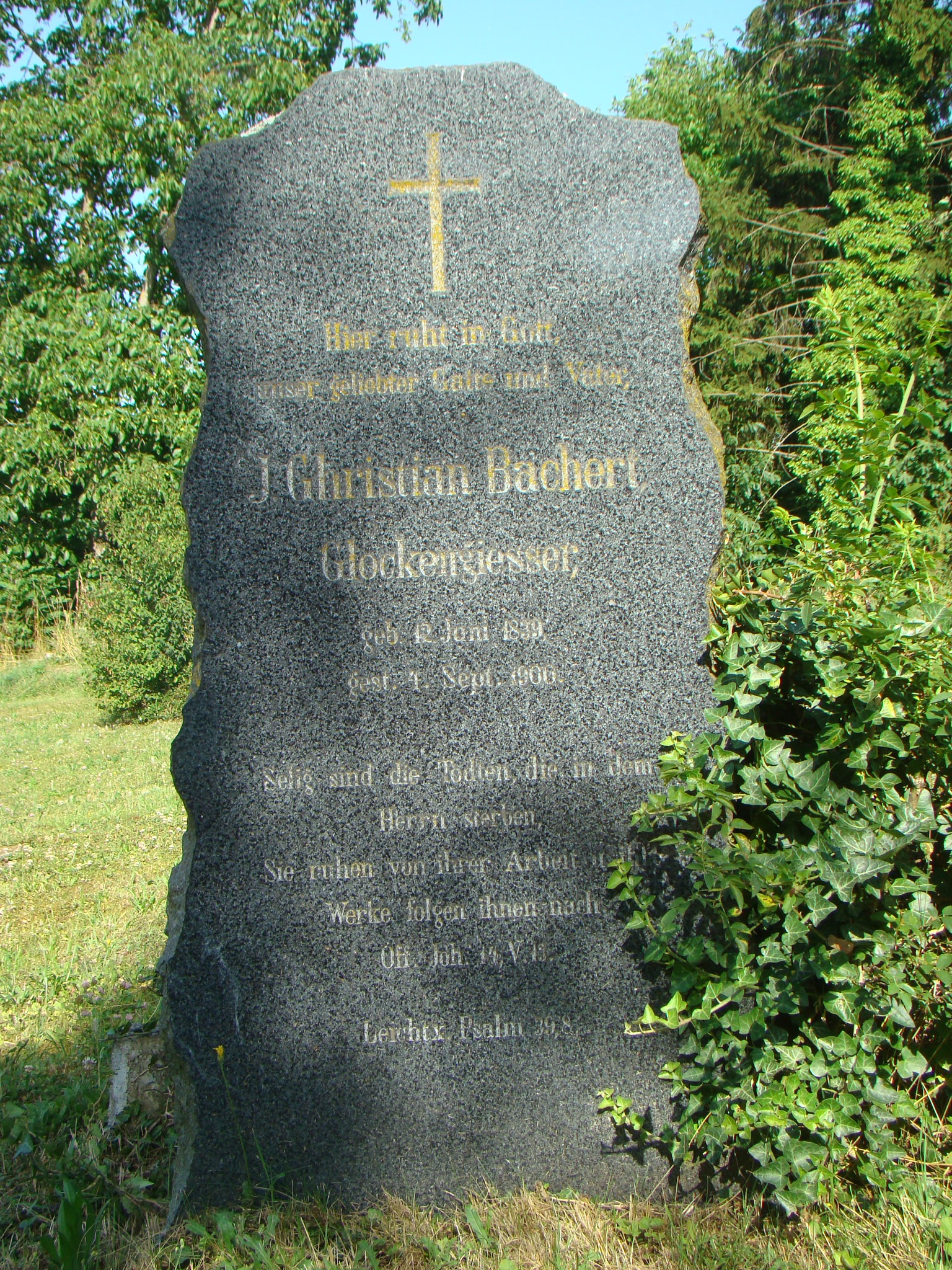 Impressionen aus Elztal-Dallau, Bachert-Grabstein